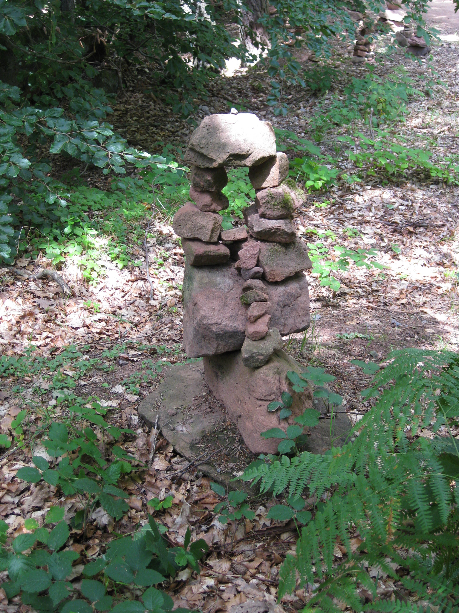 Steinmännchen der anderen Art